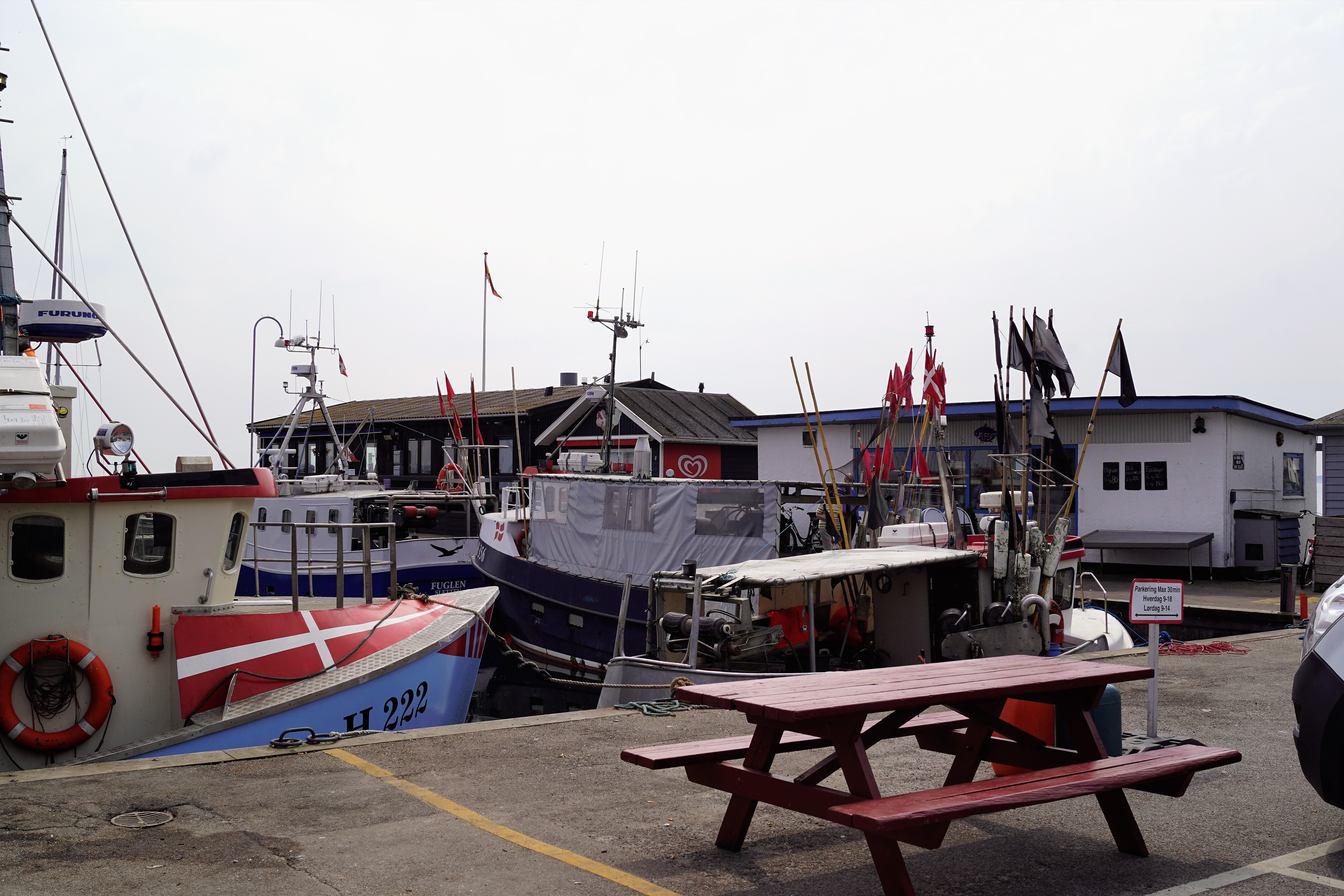 Sletten Havn